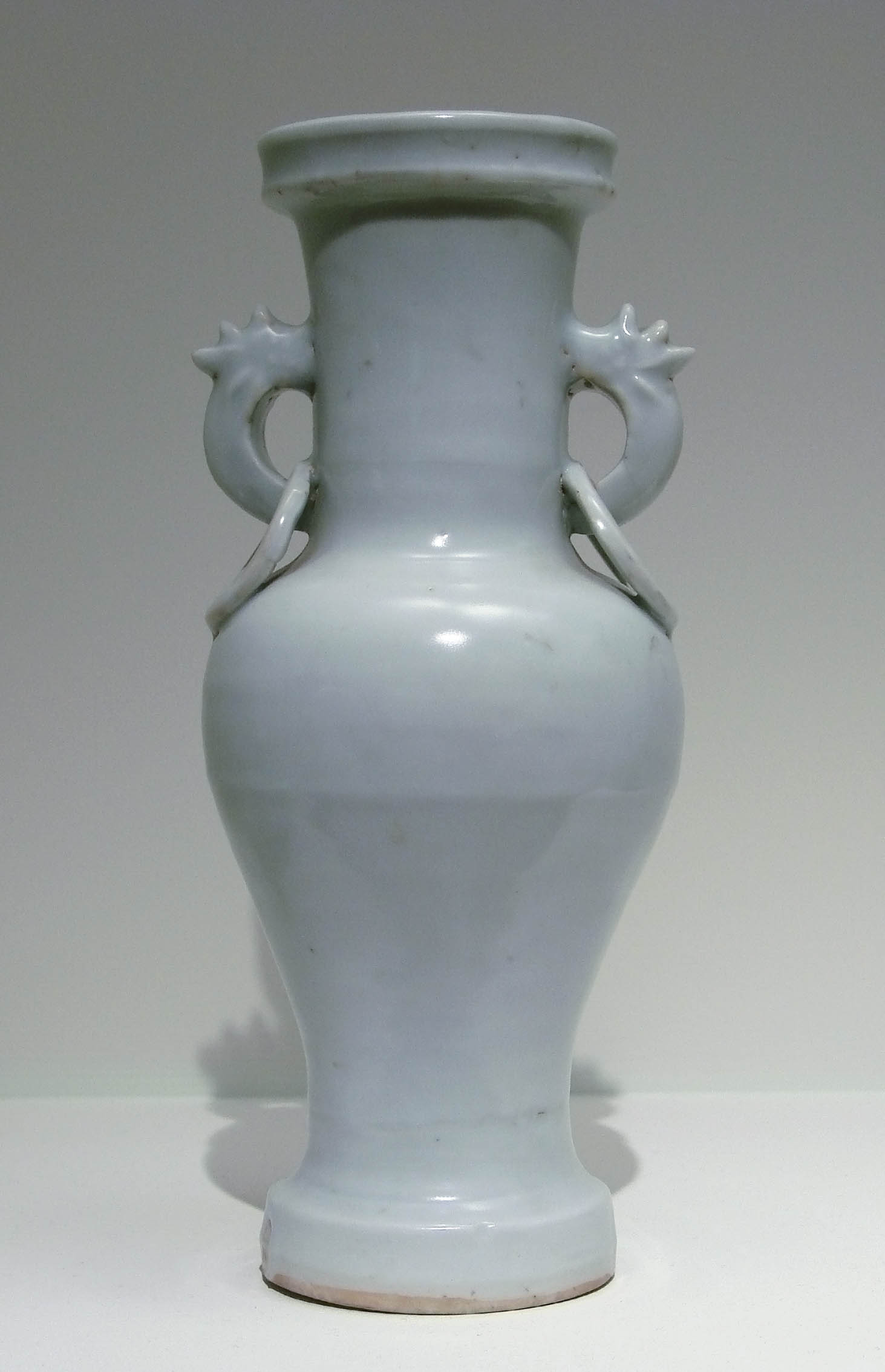 Vase à anses, porcelaine blanche à couverte blanc bleuté "qinbai". Chine du Sud, Fujian, Dehua, Dynastie Yuan, 14ème siècle. Musée Guimet, Paris.